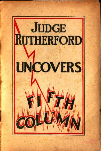 Broszura SJ z 1940 roku "Sędzia Rutherford demaskuje piątą kolumnę", która piętnowała wsparcie udzielone przez Kościół katolicki faszystowskim władzom